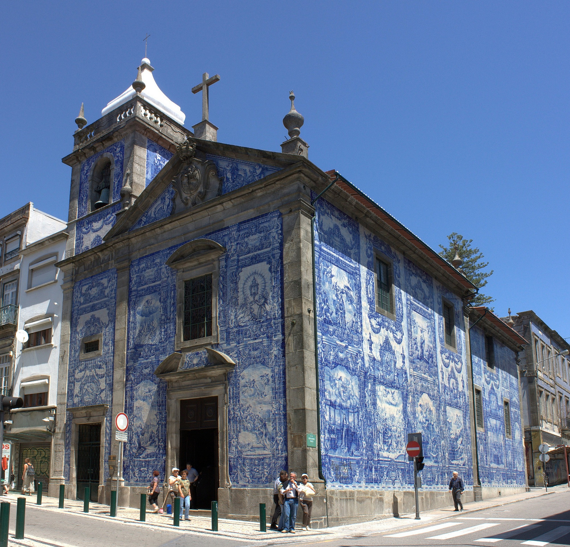 Capela das Almas, Santo Ildefonso, Porto, Portugal